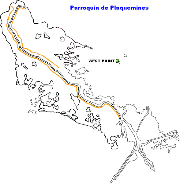 West Point, Louisiana.